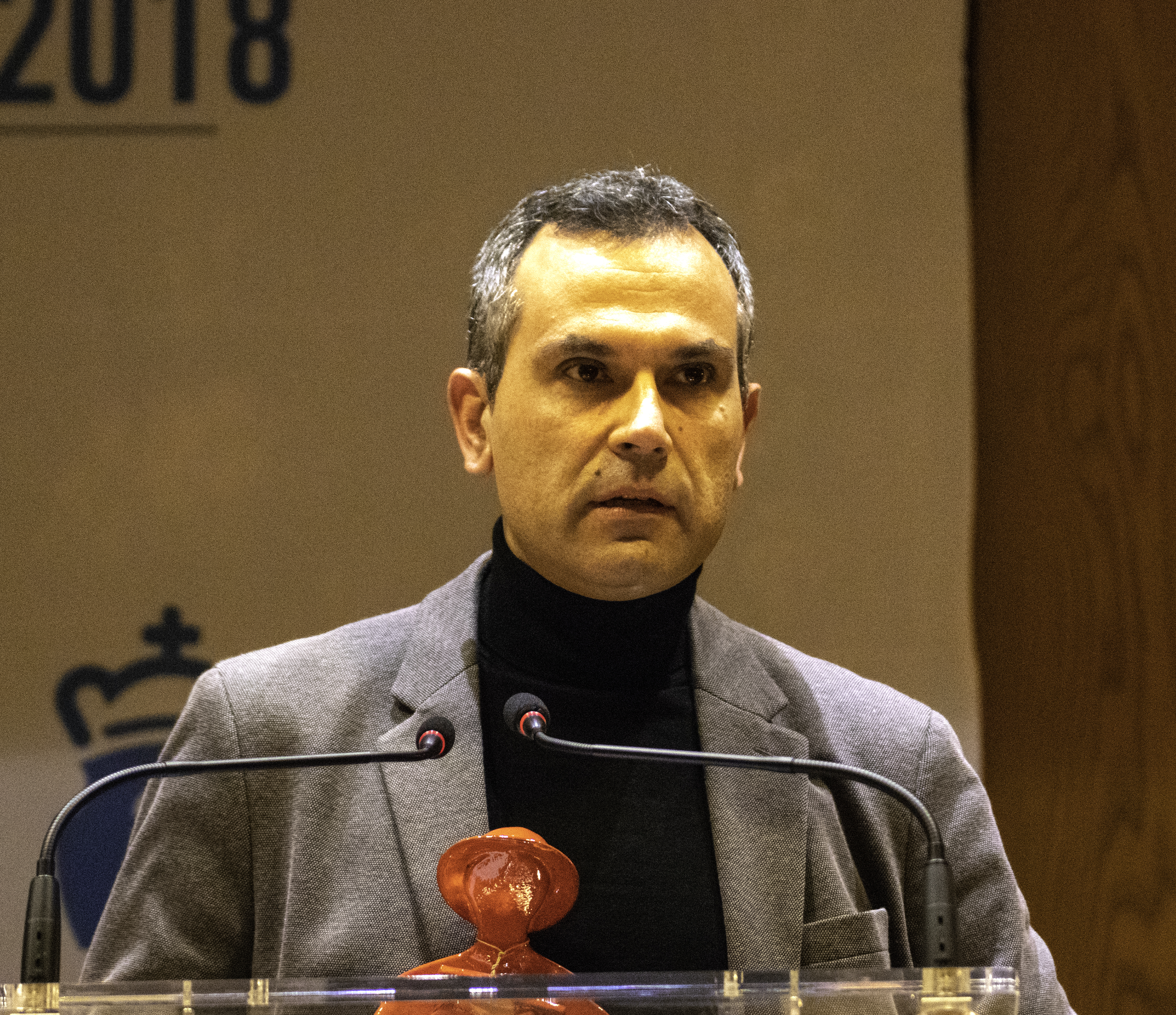 O escritor galego Xabier López López recibindo a premio Torrente Ballester da Deputación da Coruña en 2018.